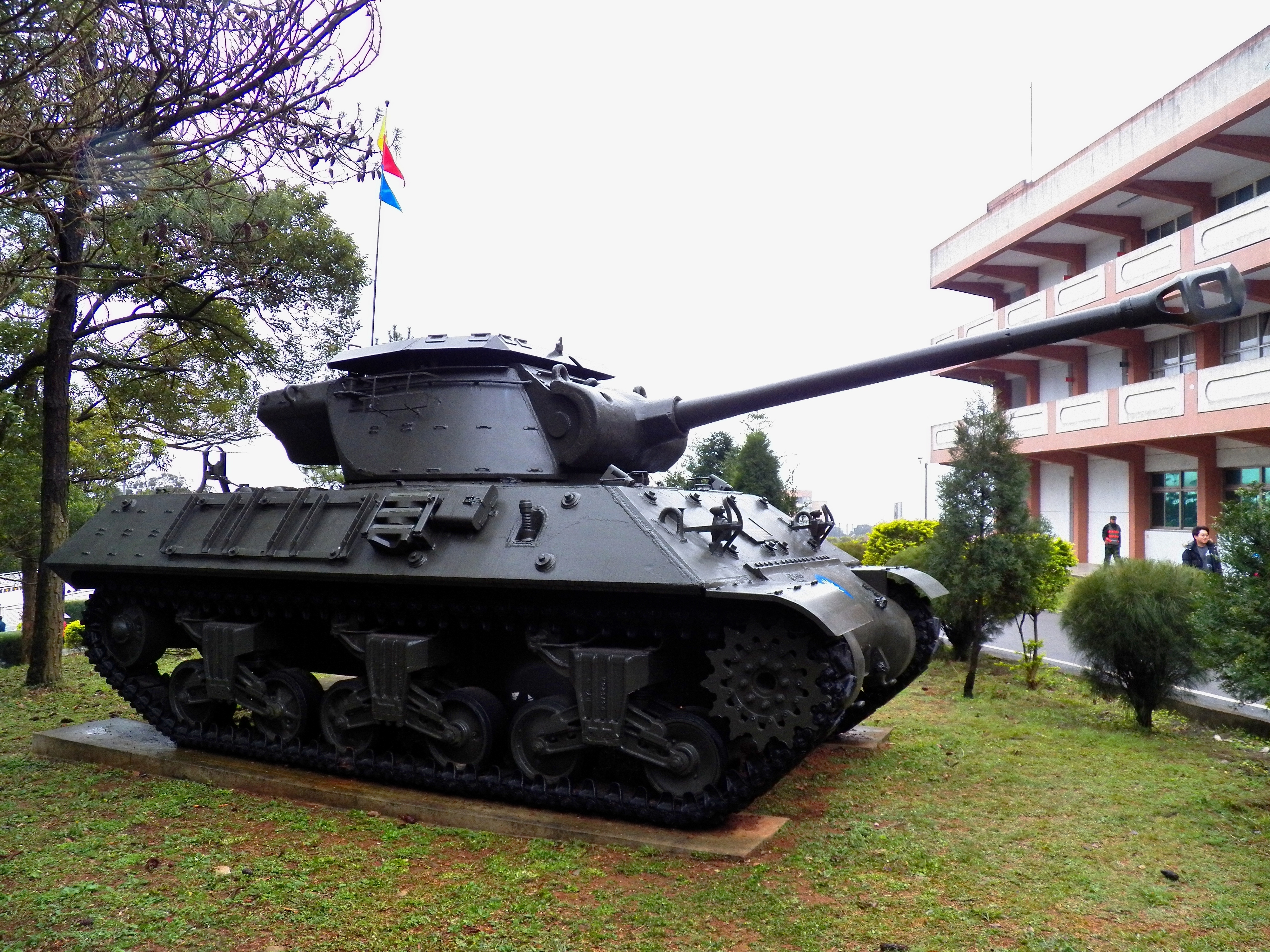 裝甲兵學校戰車公園保存的M36驅逐戰車。